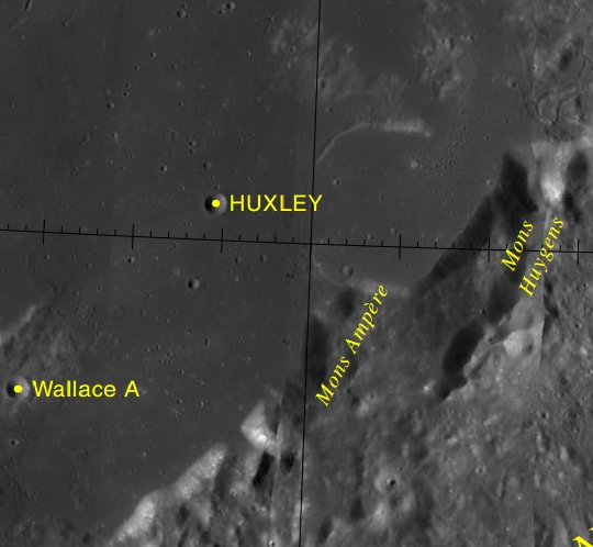 Monte lunar Mons Ampère. (Imagen LRO)